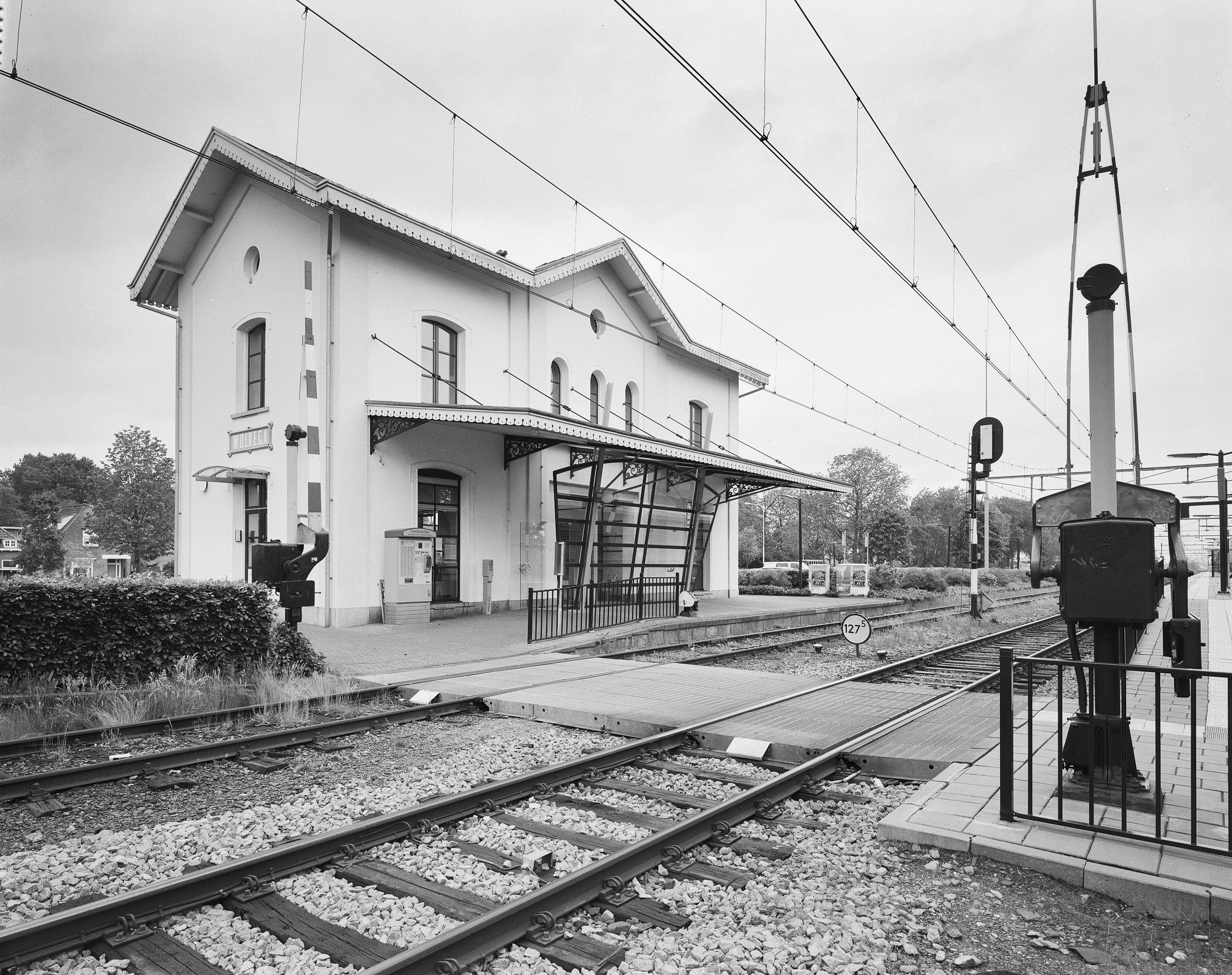 Station: Overzicht gevel aan de perronzijde en rechter zijgevel, station (opmerking: Gefotografeerd voor Monumenten In Nederland Friesland, bladzijde 318)